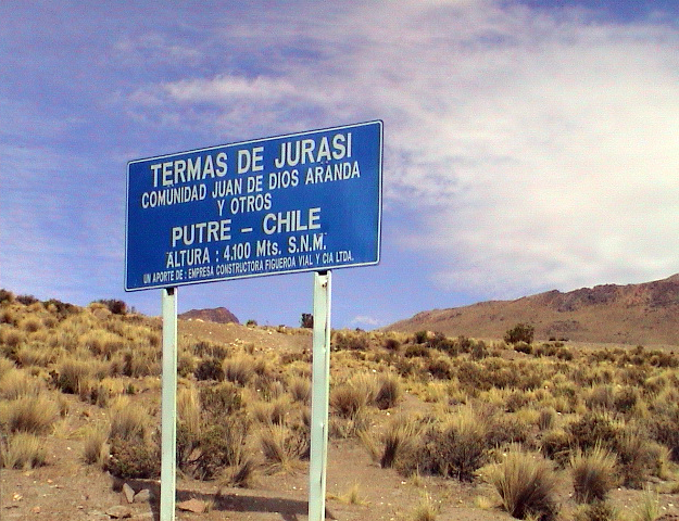 Rètol informatiu situat al camí d'accés a les Termes de Jurasi, Putre, Xile, a 4.100 metres d'altitud sobre el nivell del mar.